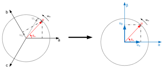 Clarke-n Transformatua